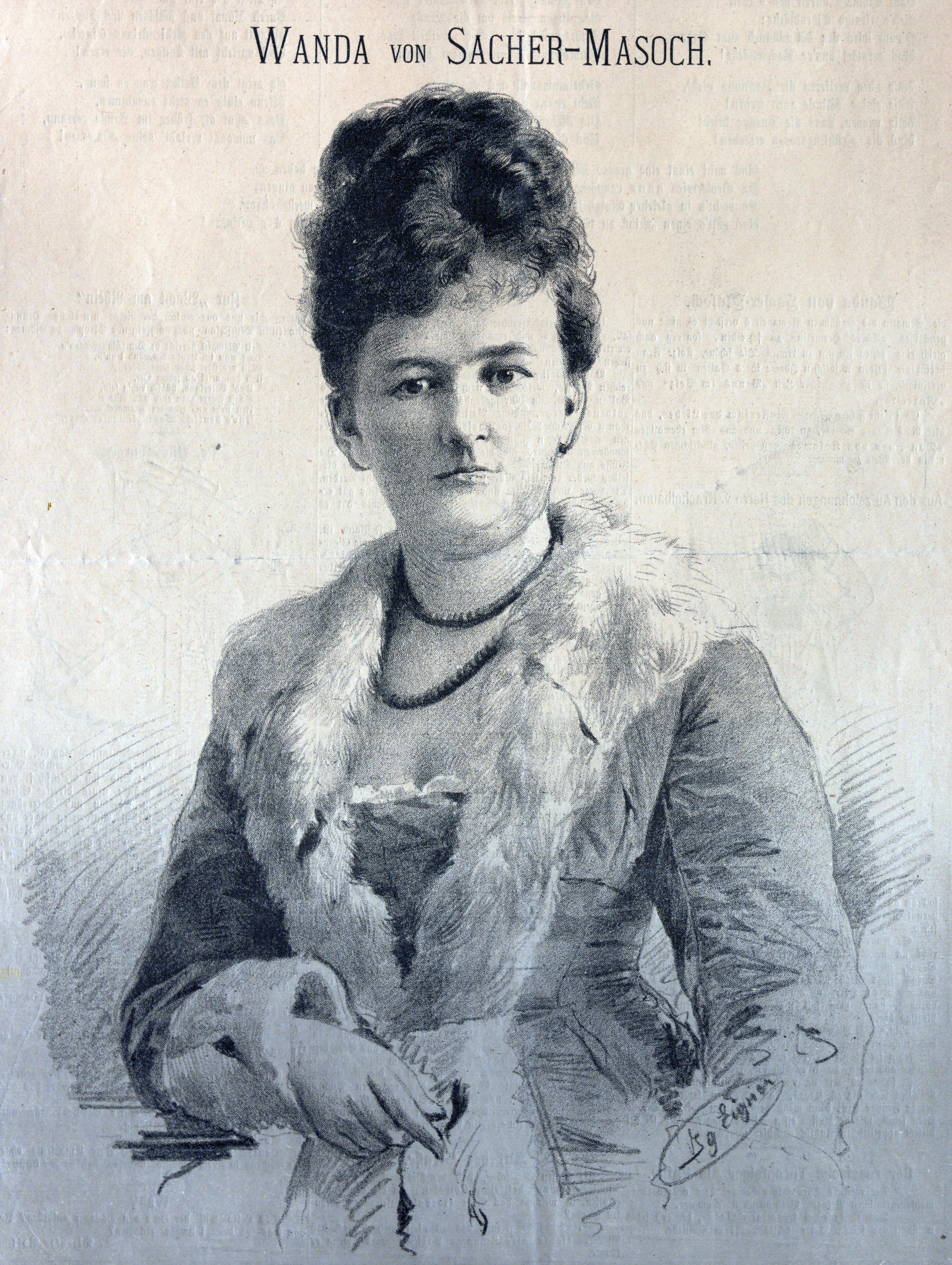 Wanda von Sacher-Masoch (1845-um 1906), Schriftstellerin